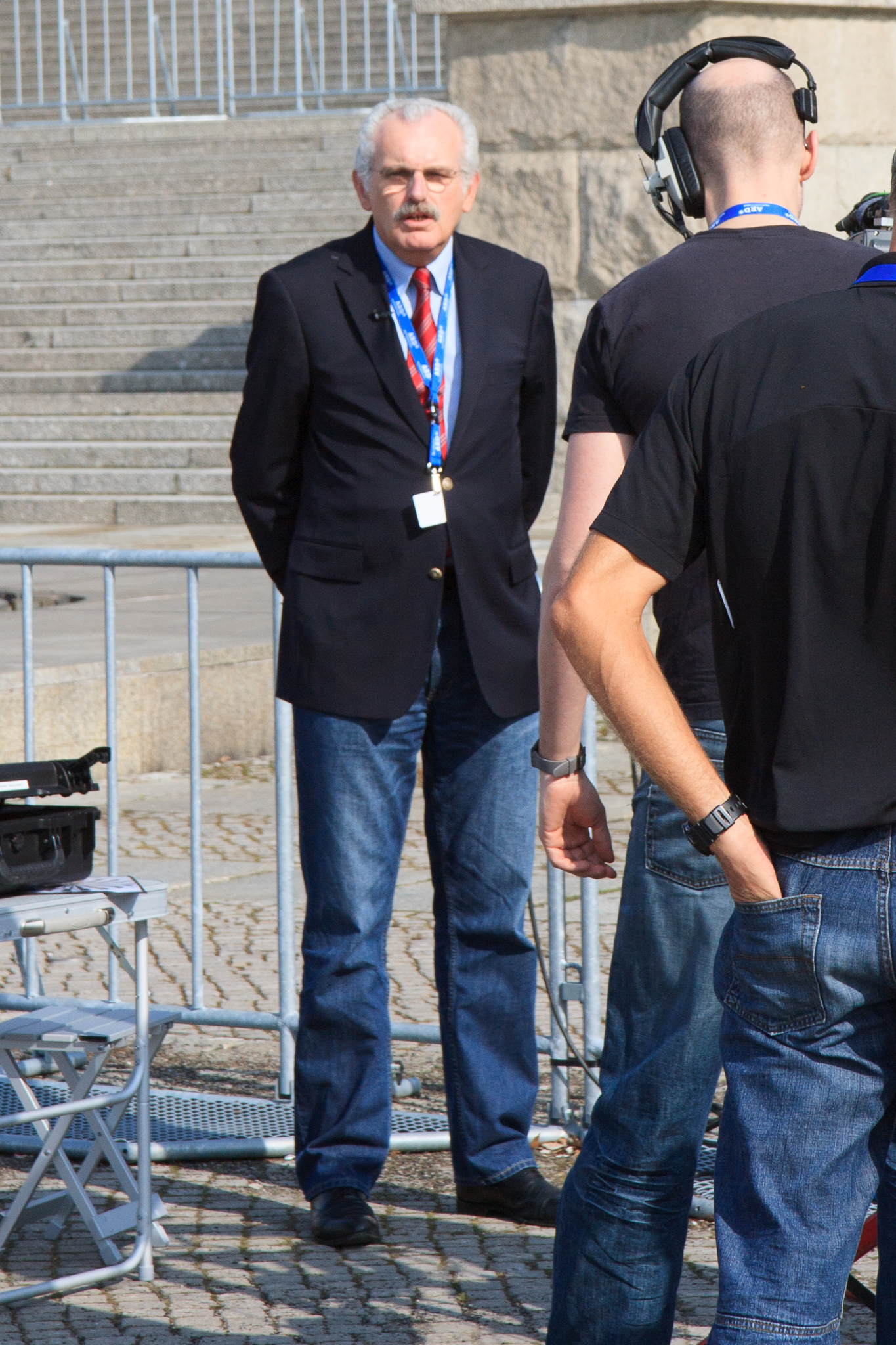 Ulrich Deppendorf während einer Fernsehaufnahme vor dem Reichstag in Berlin